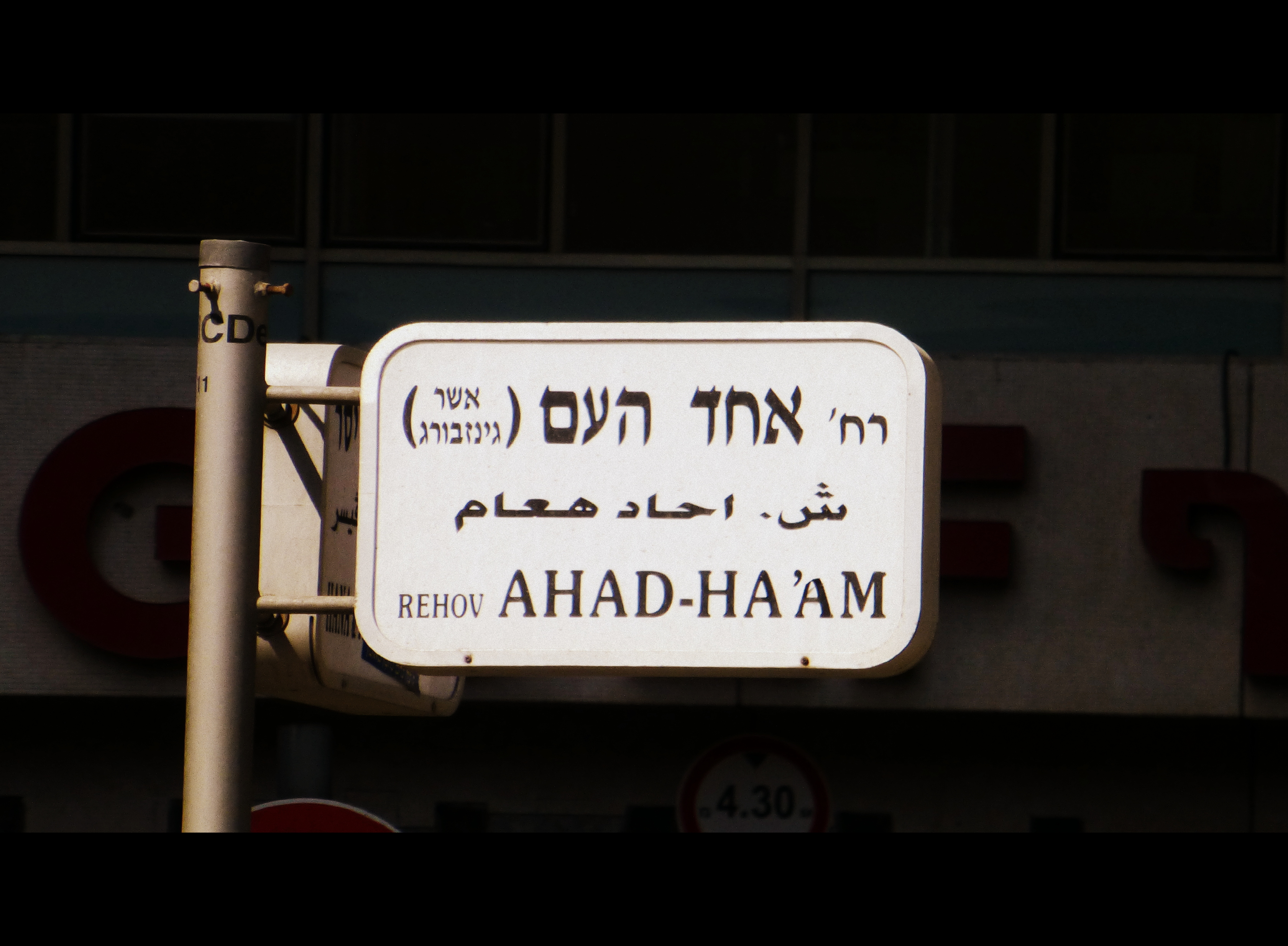 רחוב אחד העם הוא אחד הרחובות הוותיקים במרכזה ההיסטורי של תל אביב הקרוי על שמו של הסופר הציוני אחד העם (שם העט של אשר צבי גינצברג) שגם התגורר ברחוב עד מותו. הרחוב מתחיל בקצה שכונת שבזי במערב ומסתיים במתחם הבימה בצפון מזרח, בפינת שדרות בן ציון, והוא אחד הרחובות החשובים של רובע לב תל אביב.